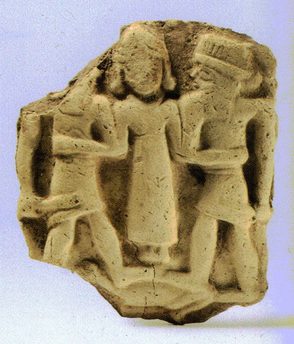 Terracotta figurines in Ancient time - Israeli National Maritime Museum. Haifa צלמיות בעת העתיקה, מאוסף המוזיאון הלאומי הימי בחיפה צלמית היא פסלון קטן ממדים בצלם אדם או בעל חיים. הצלמית יוצרה מחומרים שונים בעיקר טין, אבן ומתכת. על פי הצלמית ניתן ללמוד על מנהגי פולחן , אורחות חיים ומנהגים של התרבויות השונות לאורך ההיסטוריה. מקום הימצאן הפיזי כפי שהן נמצאות בעת חפירה ארכאולוגית מאפשר הסקת מסקנות לגבי השימושים של הצלמיות כגון, חפצי קדושה, קמע פוריות, קמע מזל ועוד. הצלמיות הקדומות ביותר במזרח הקרוב הופיעו בתקופה הניאוליתית קדם-קראמית (מחצית האלף ה-9 לפנה"ס – ועד סוף האלף ה-6 לפנה"ס) לוחית חרס מתקופת הממלכות איסין-לרסה והבבלית הקדומה במסופוטמיה 2000 -1600 לפני הספירה. אלה לבושה שמלה ארוכה, ניצבת על חיה כורעת. משני צידיה גברים מזוקנים המפנים מבטם אליה. הגברים לבושים חצאיות קצרות ולראשם כובע, אולי מנוצות. הם אוחזים בידיהם מקלות This image was taken as part of the Wikipedia Loves Art project and is uploaded curtesy of the National Maritime Museum in Haifa. In any use of this image credit need be given to the Museum as well as the photographer. The copyright holder of this file allows anyone to use it for any purpose, provided that the copyright holder is properly attributed. Redistribution, derivative work, commercial use, and all other use is permitted. This image was taken as part of the Elef Millim project trip and within the Wikipedia Loves Art project to the National Maritime Museum in Haifa in the northern part of Israel, which was held on Friday, 22nd January 2010. To view all images uploaded as pary of the Elef Millim Project